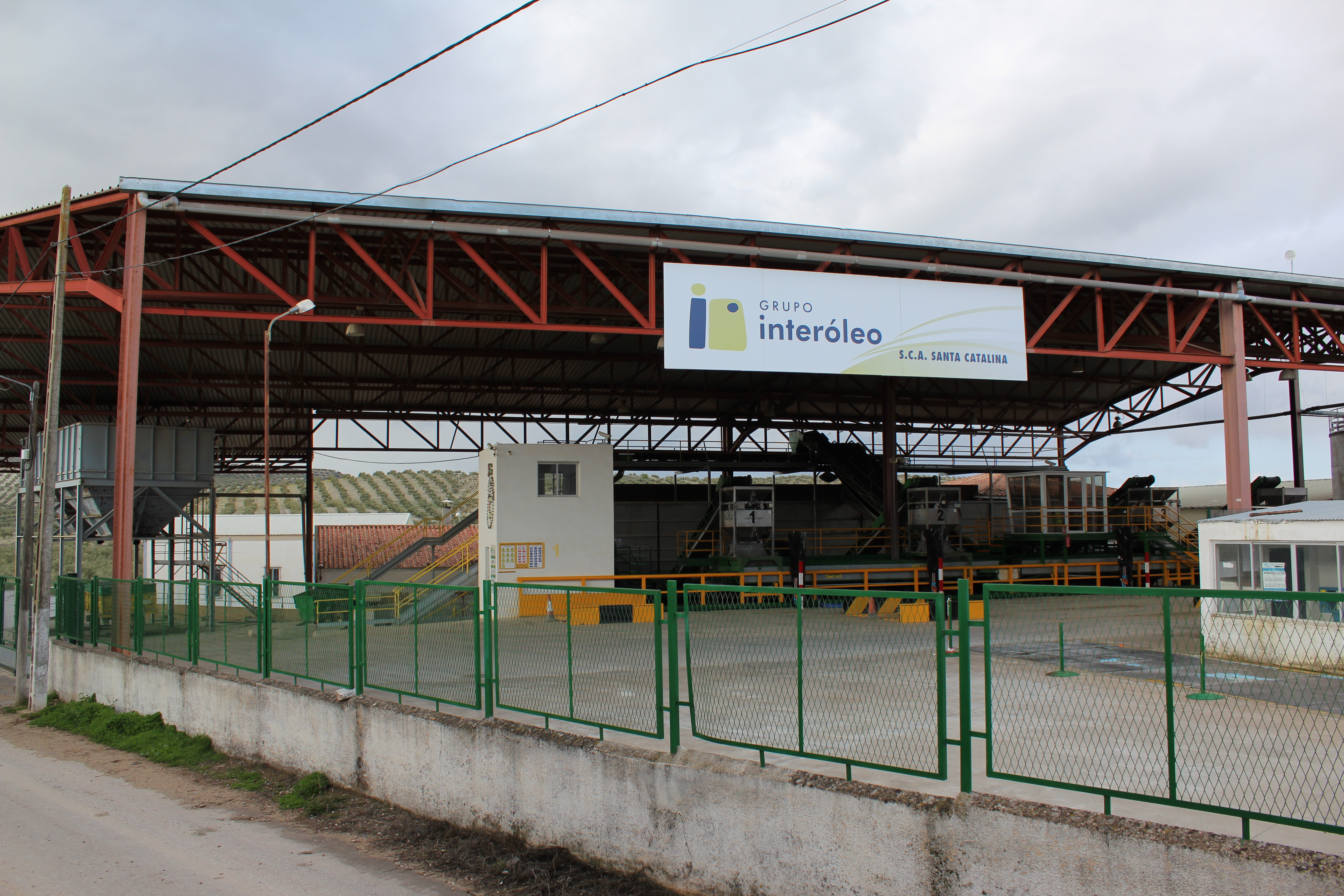 Vista de la almazara instalada junto al núcleo de Garcíez.